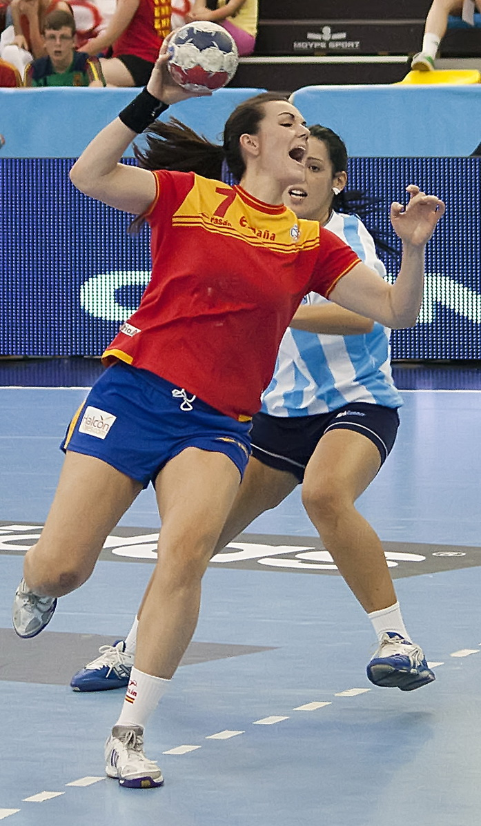 Beatriz Fernández en el torneo celebrado en España, del 25 al 27 de mayo de 2012, clasificatorio para los Juegos Olímpicos de Londres 2012.